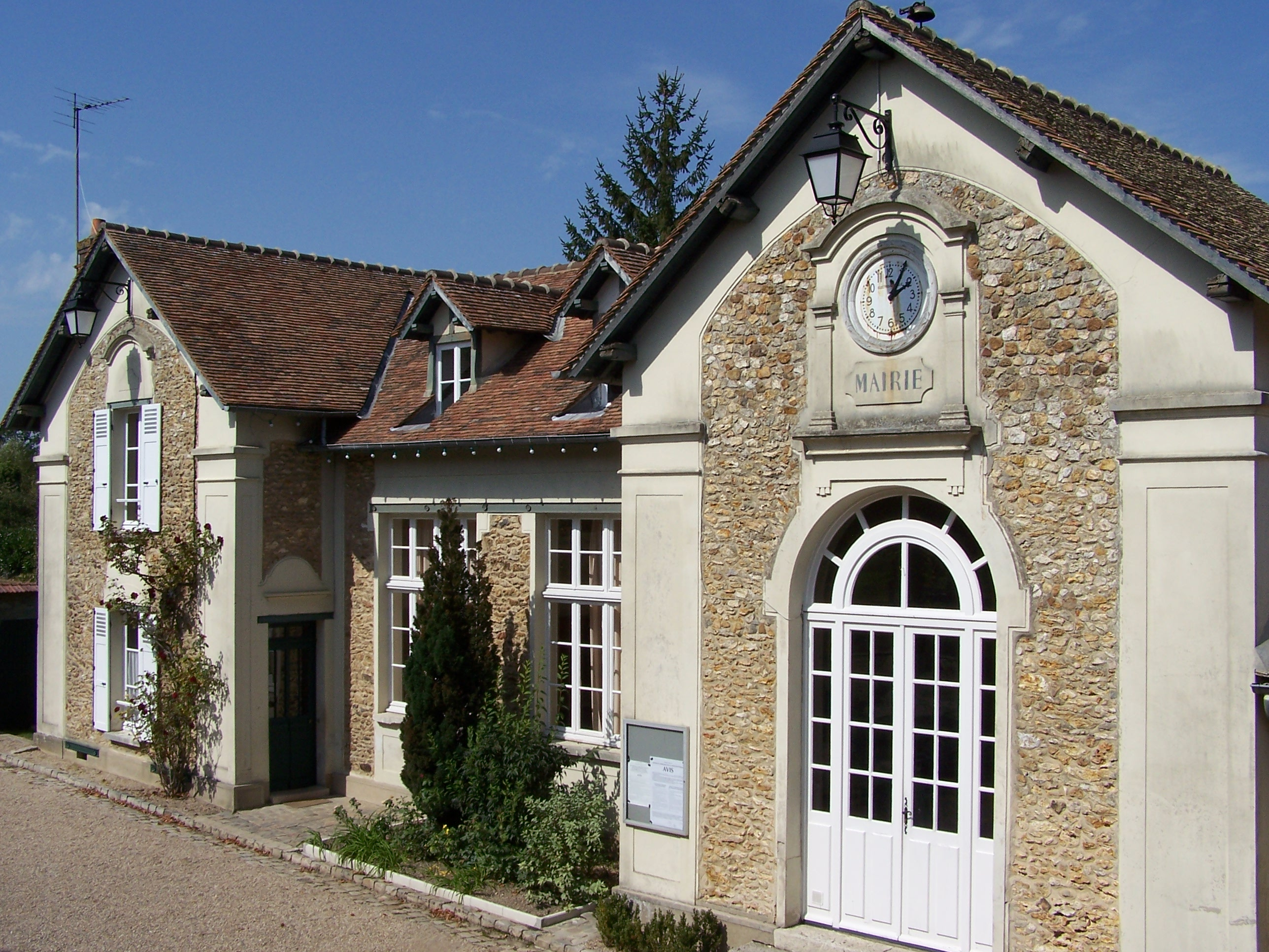 Mairie de Millemont (Yvelines, France)